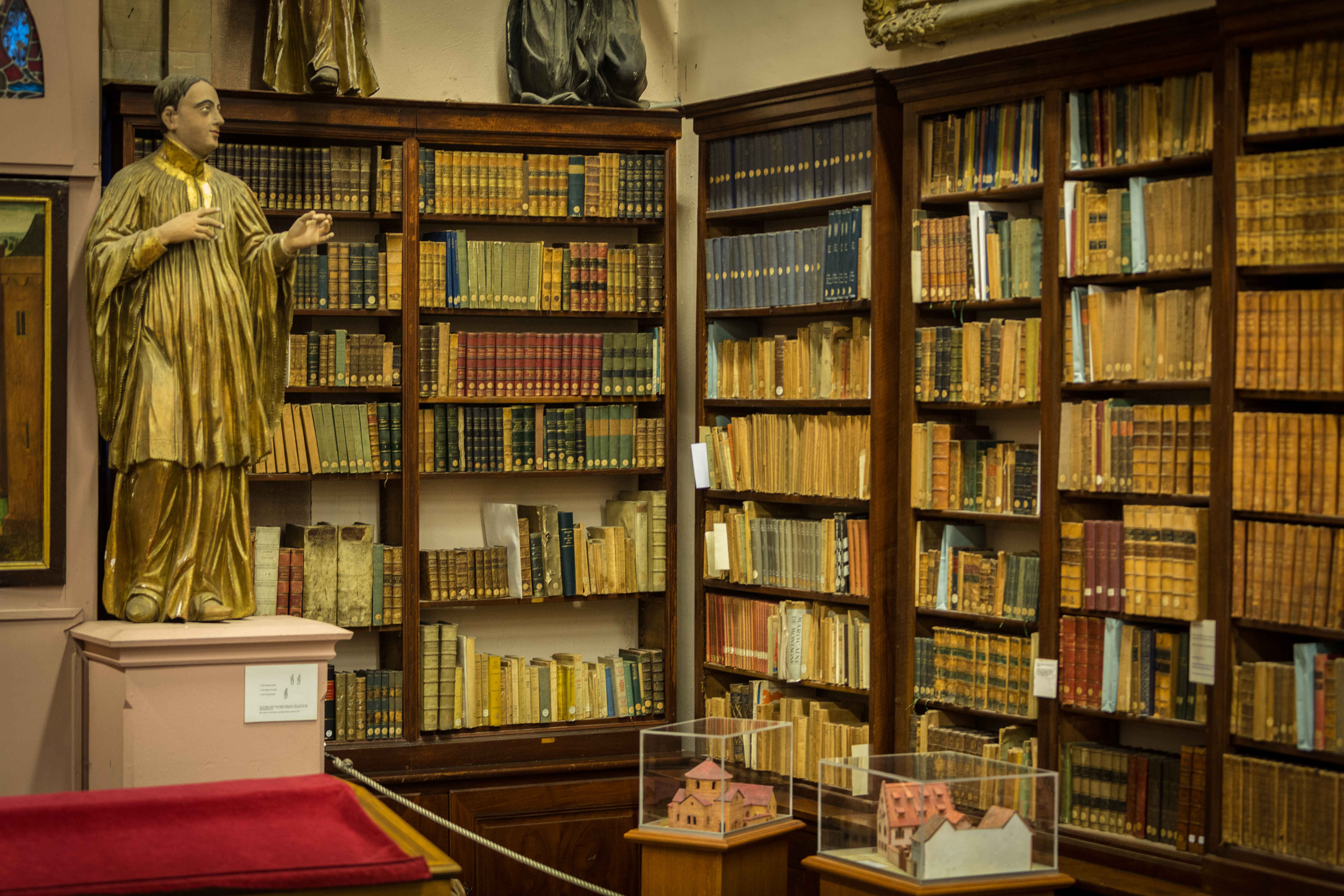 Bibliothèque humaniste de Sélestat 21 janvier 2014. Descriptions à venir